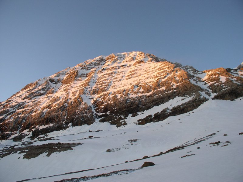 Le taillon par la brèche de Roland en juin 2007